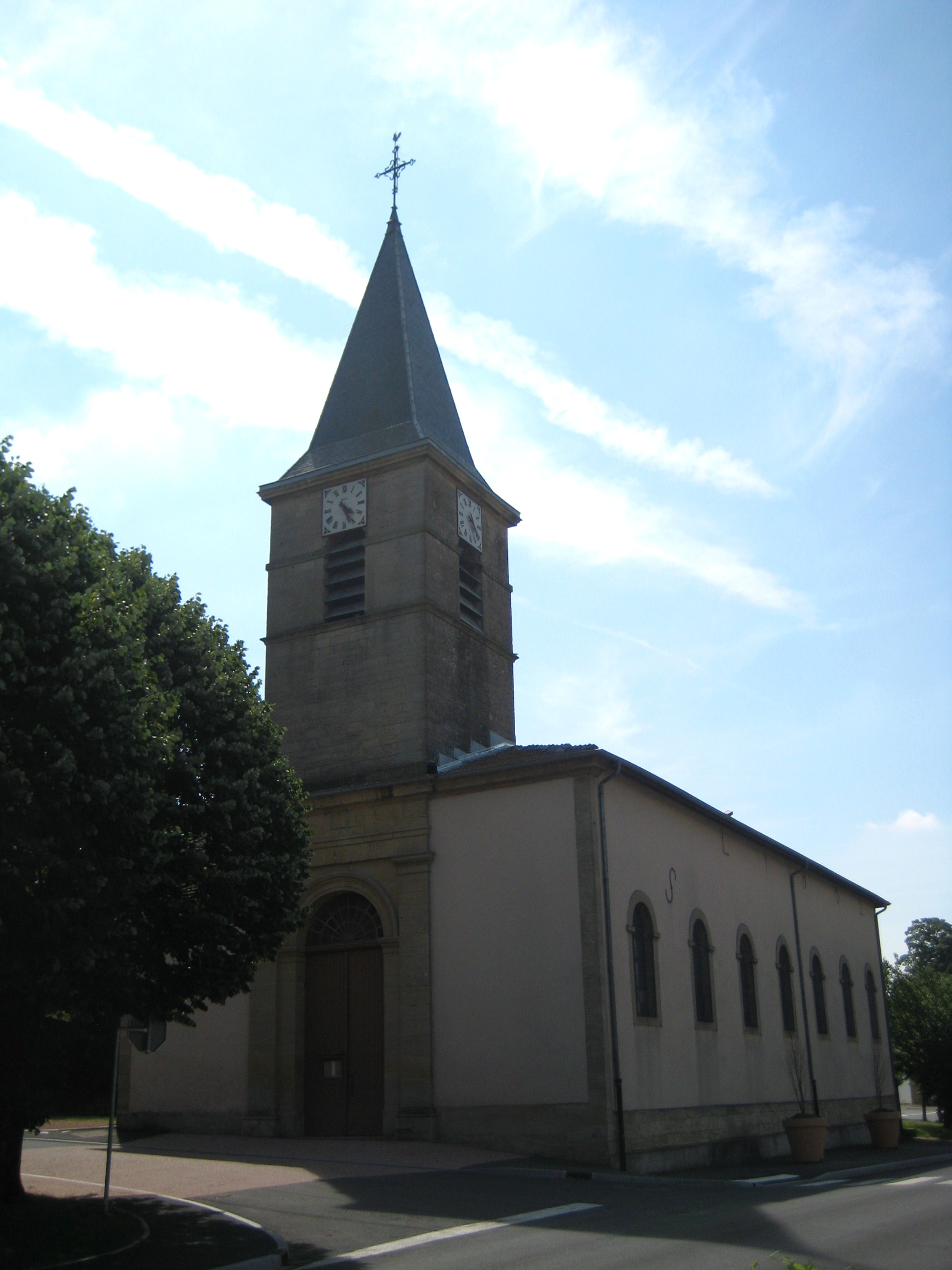 Description Église paroissiale Notre-Dame-de-l'Assomption de TucquegnieuxDate 26 June 2009Source mon appareil photoAuthor Aimelaime Église paroissiale Notre-Dame-de-l'Assomption de Tucquegnieux